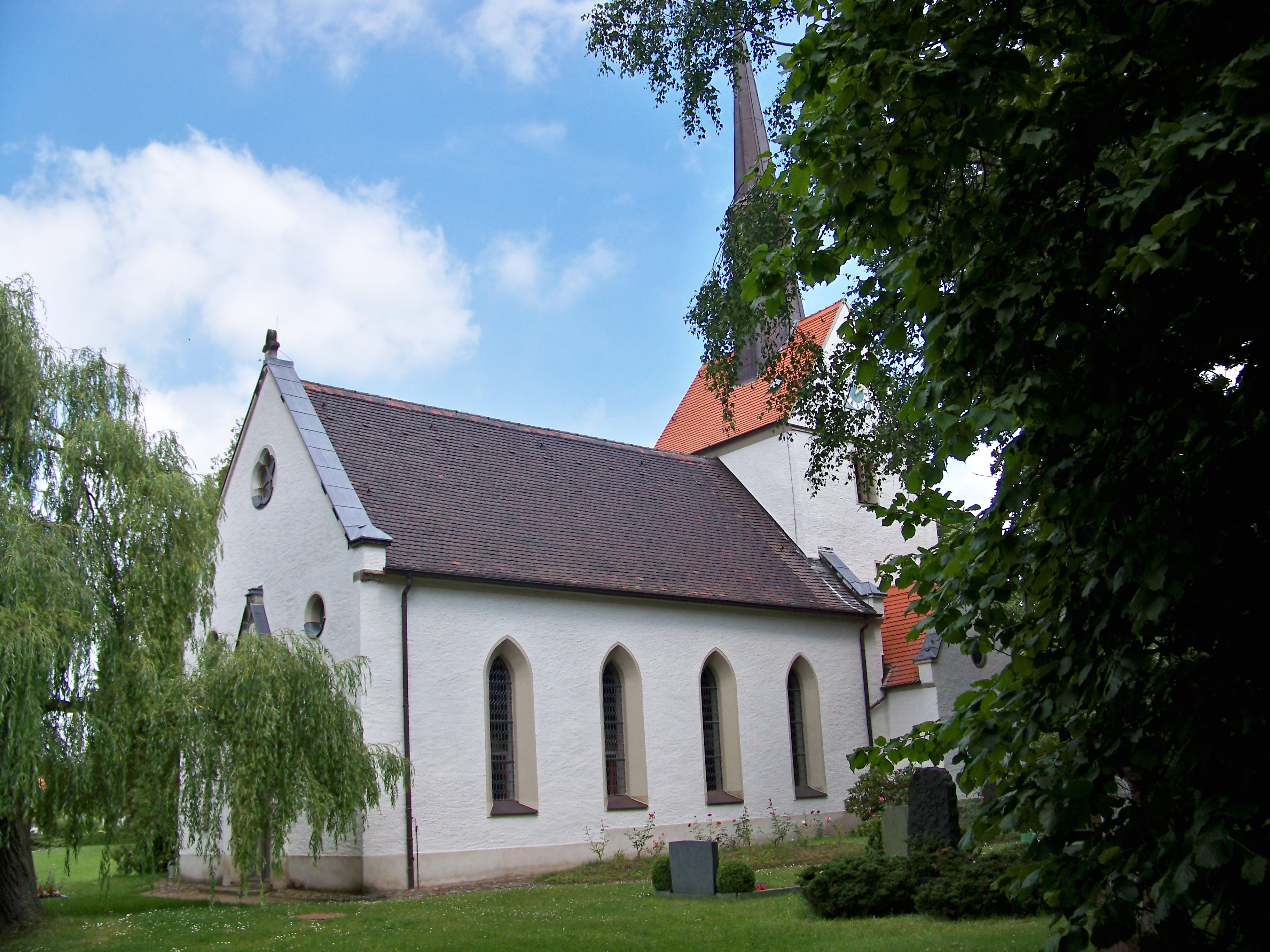 Kirche in Großsteinberg/Sachsen (Gemeinde Parthenstein)